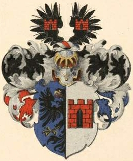 Bergi (Kandle) suguvõsa aadlivapp